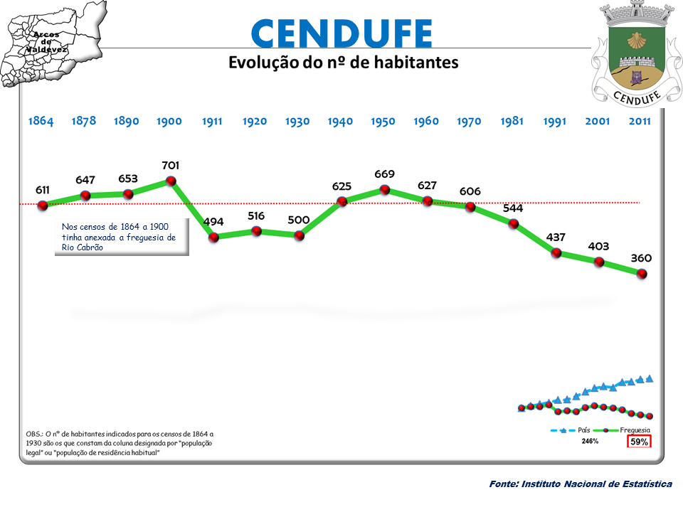 Censos 1864/2011